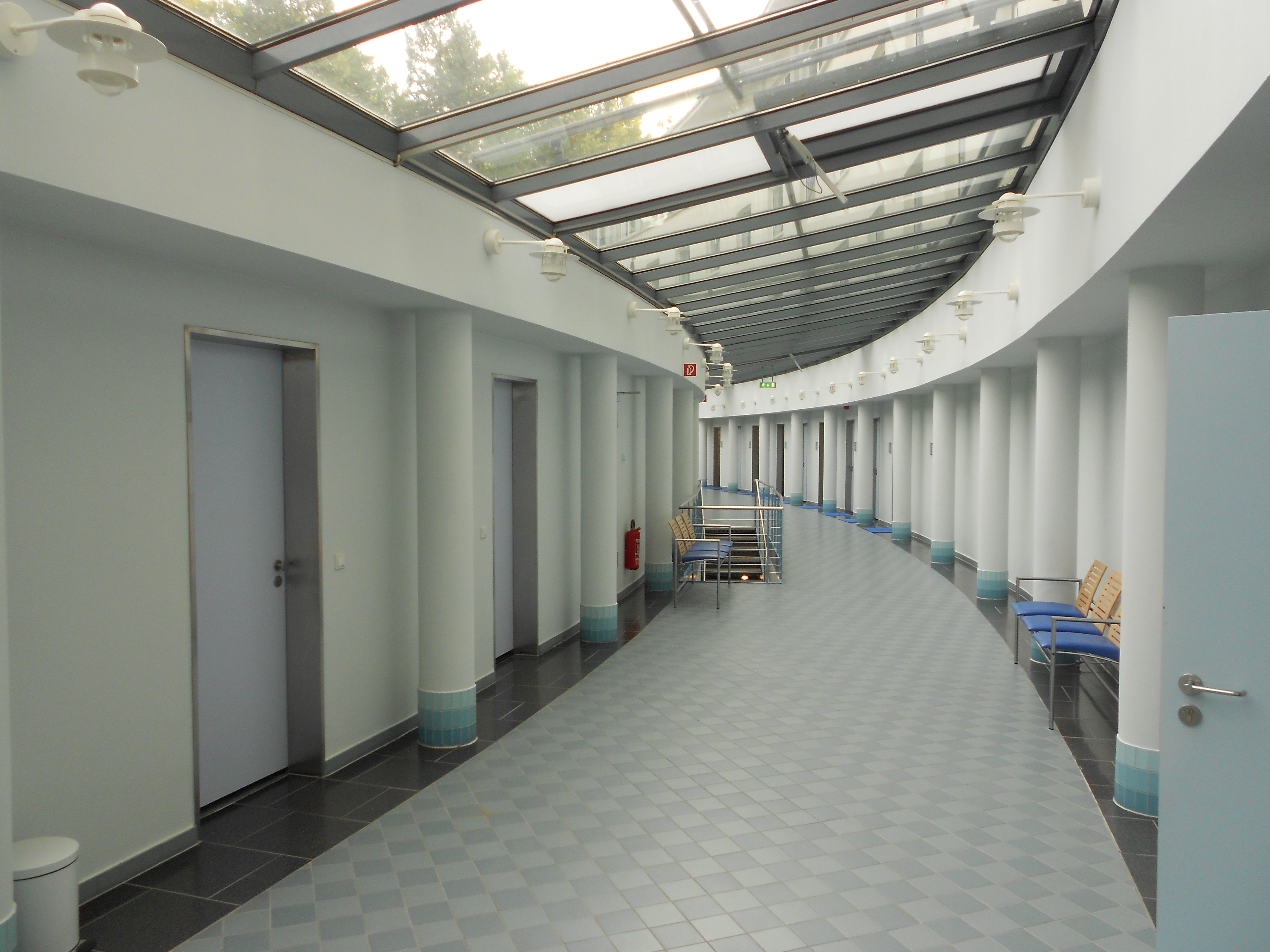 Fachklinik und Moorbad Bad Freienwalde